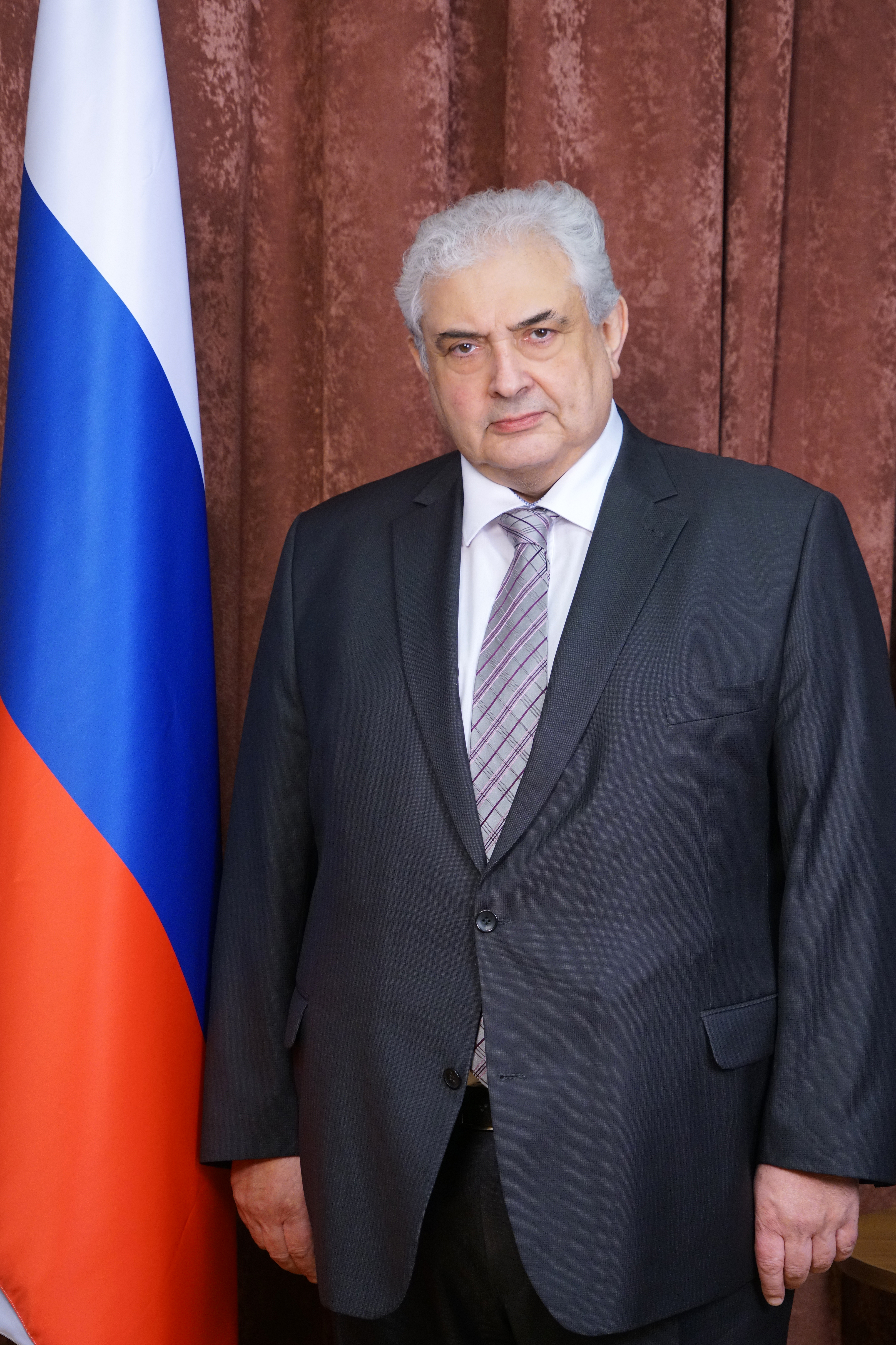 Российский дипломат и посол Российской Федерации Сергей Юрьевич Нечаев